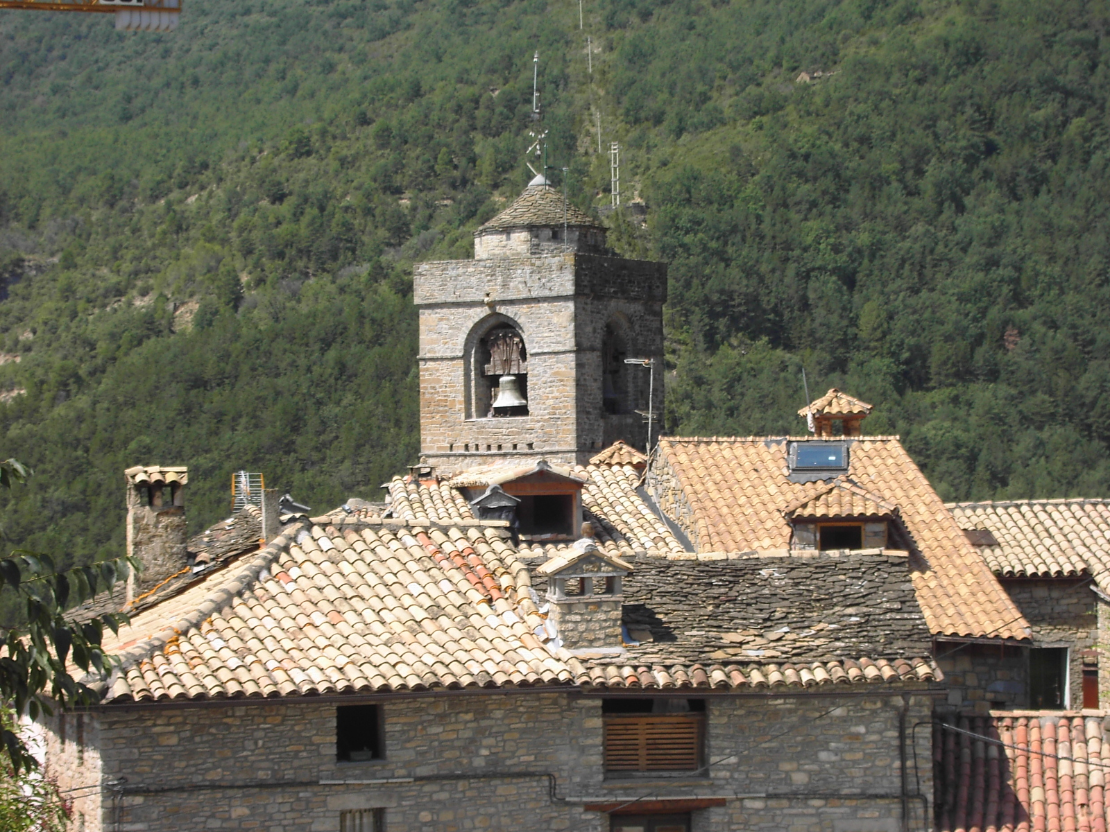 Campanario por encima de los tejados de Boltaña, capital administrativa de Sobrarbe, Huesca, España.